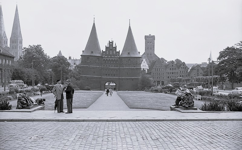 23.-28.6.1958 Lübeck Holstentor